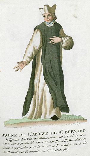 Collection de costumes de tous les ordres monastiques, supprimés à differentes époques, dans la ci-devant Belgique, Bruxelles, Philippe Joseph Maillart et sœur, 1811